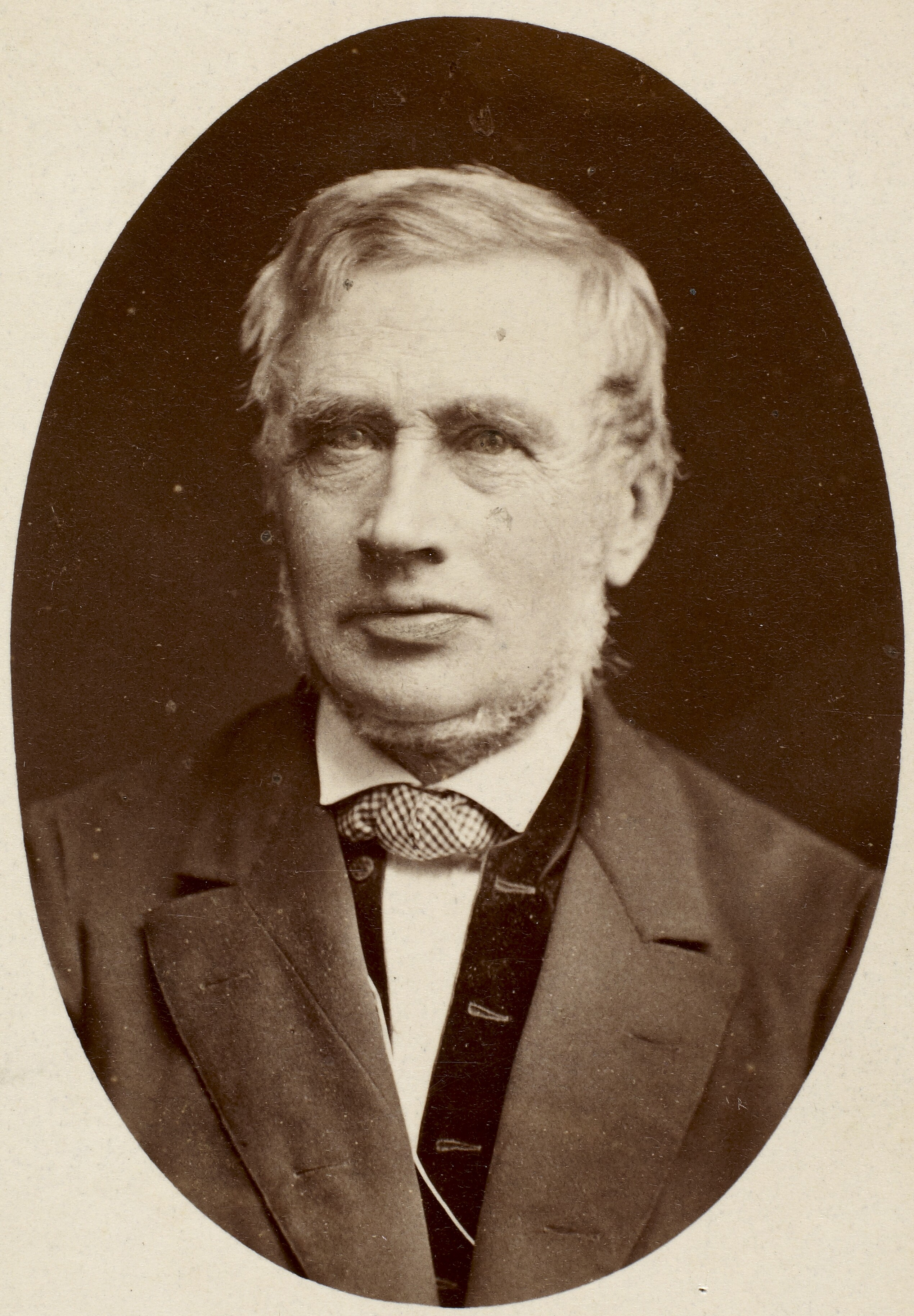 Martin Johannes Hammerich (4.dec.1811-20.sep.1881), skolemand, forfatter.